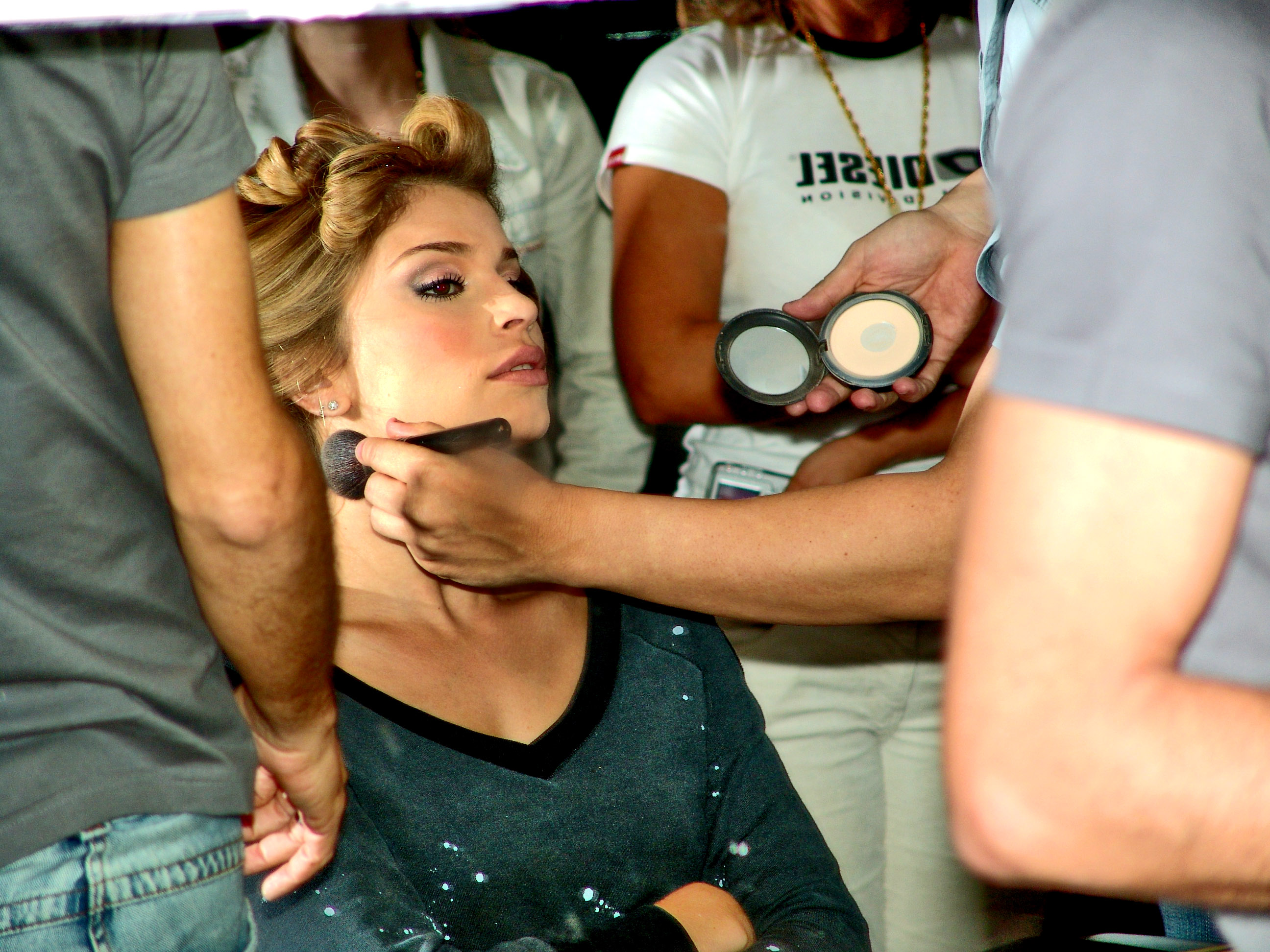 Grazi Massafera na terceira edição do Chão de Estrelas.